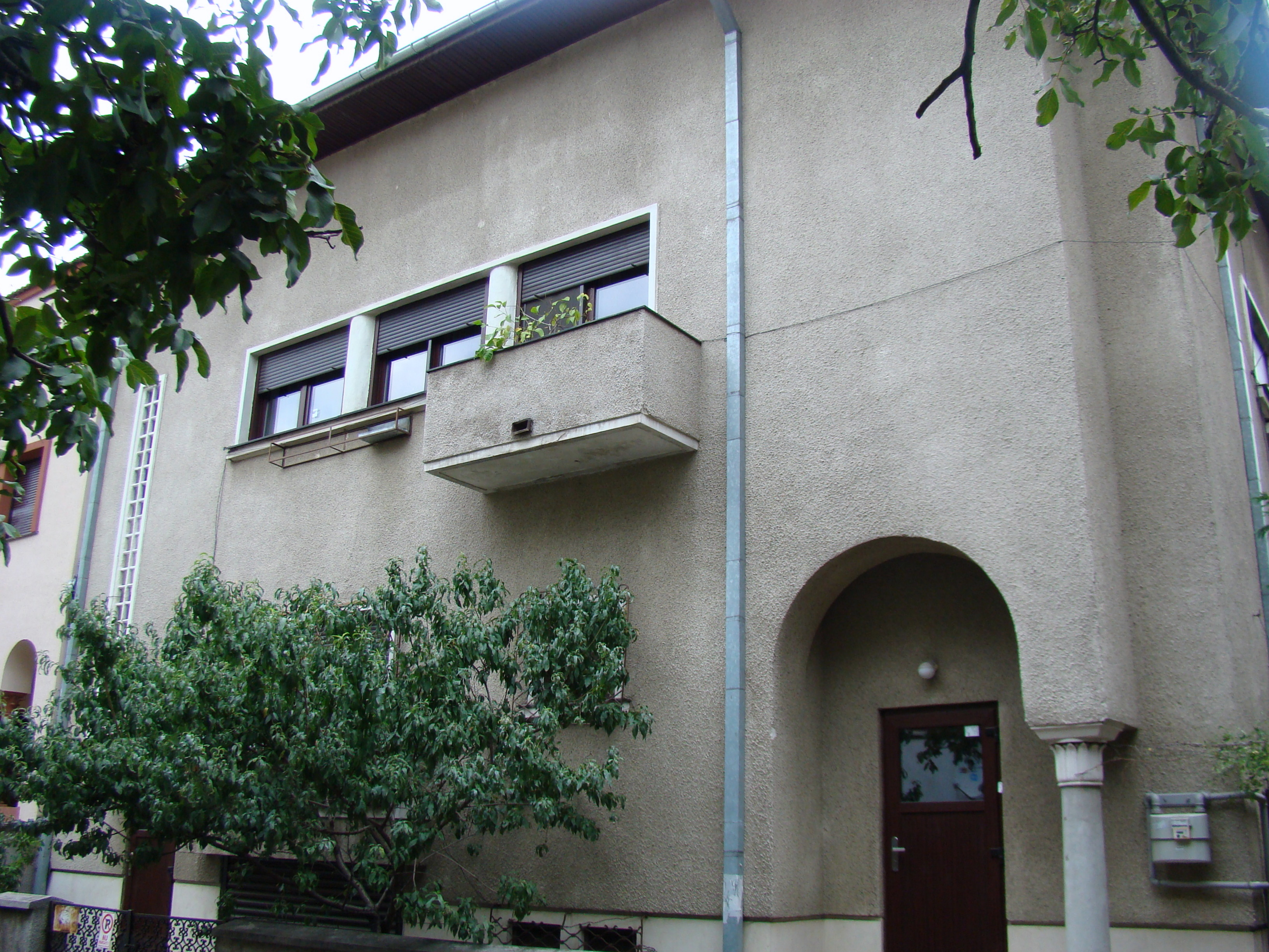 Clădire monument istoric, str. Tokio, nr.10